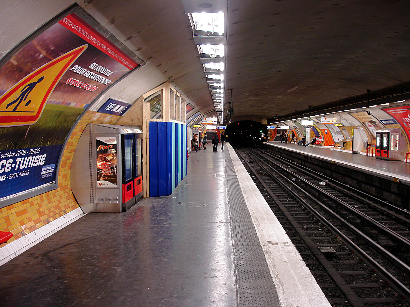 Station République de la ligne 5 du métro de Paris, France.